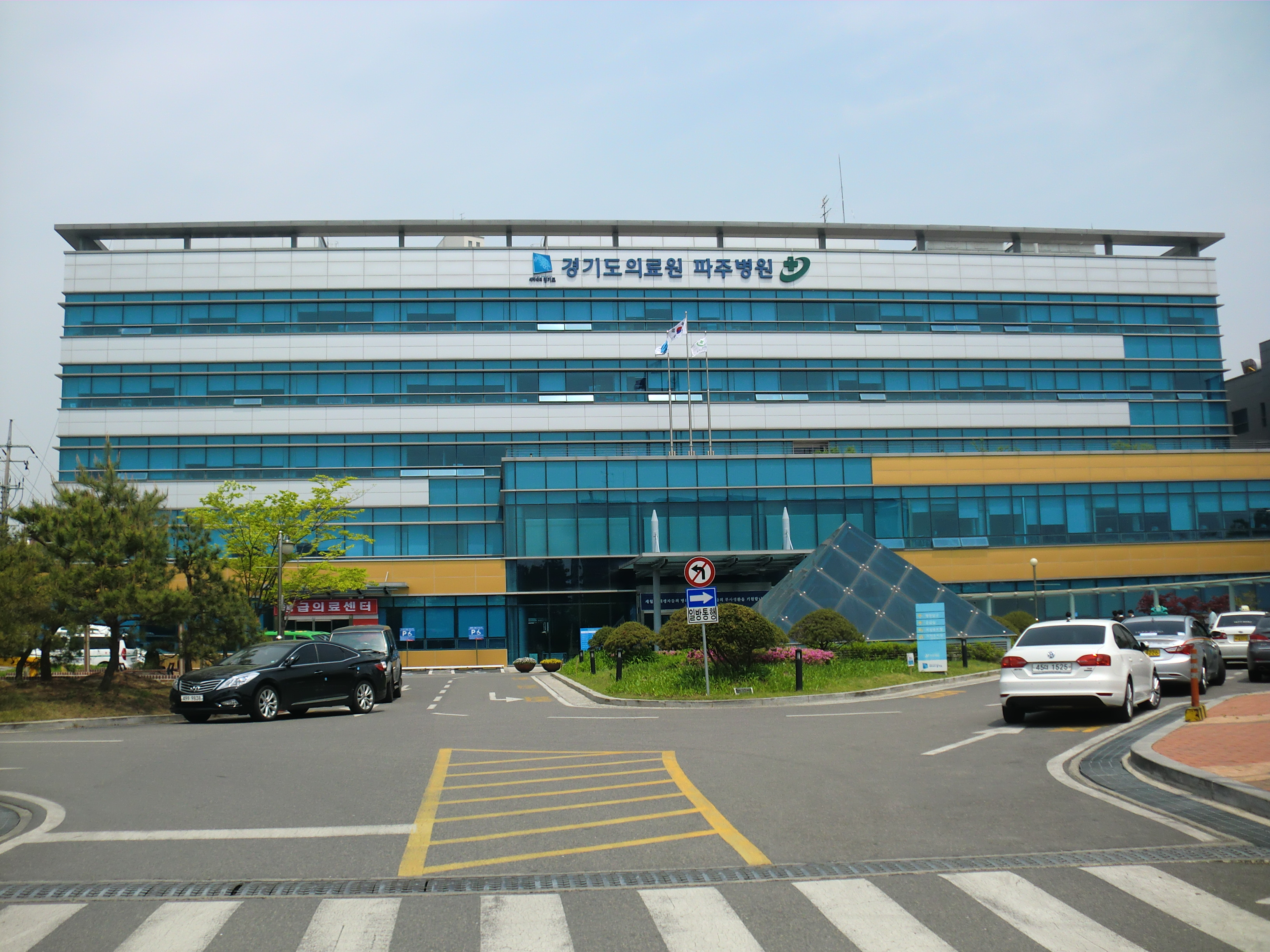 경기도 파주시에 있는 경기도의료원 파주병원